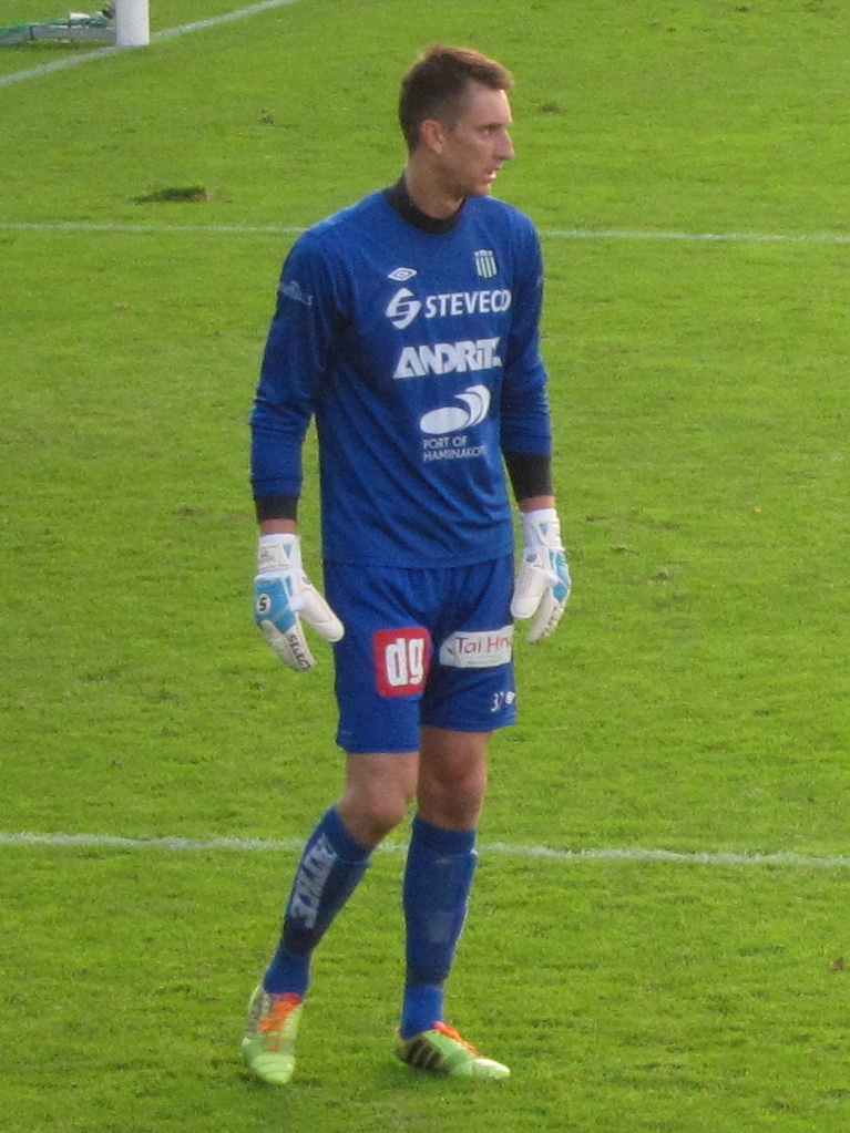 Kert Kütt, virolainen jalkapallomaalivahti FC KTP:n paidassa kaudella 2014.